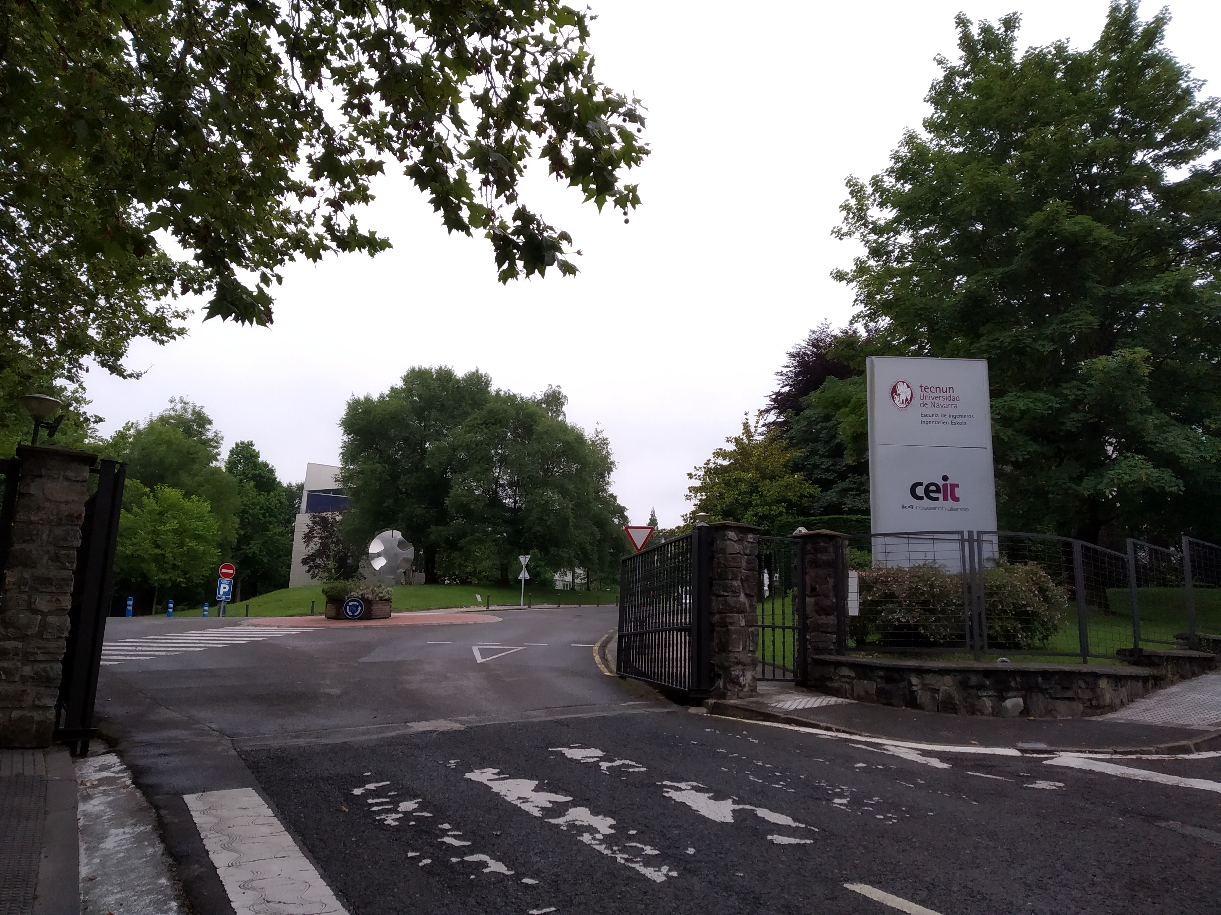 Tecnun Ibaeta